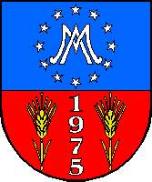 Escudo de Santa María del Cubillo